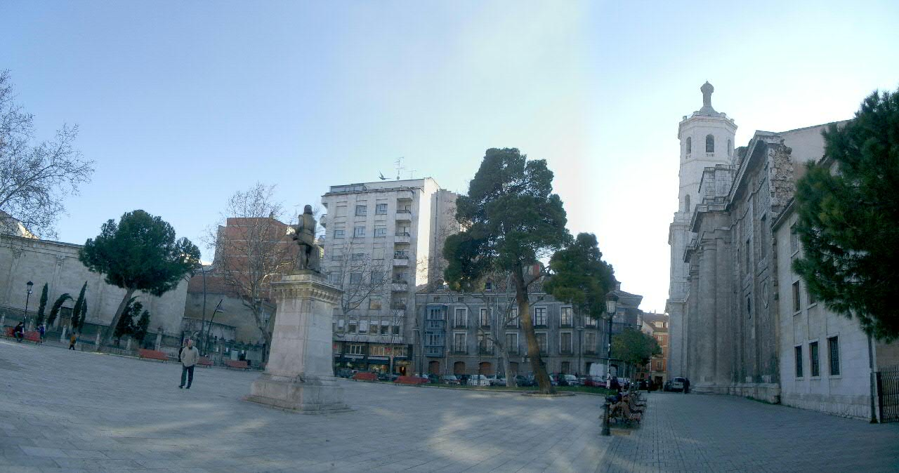 Vista panorámica de la Plaza de la Universidad estrenando reforma.